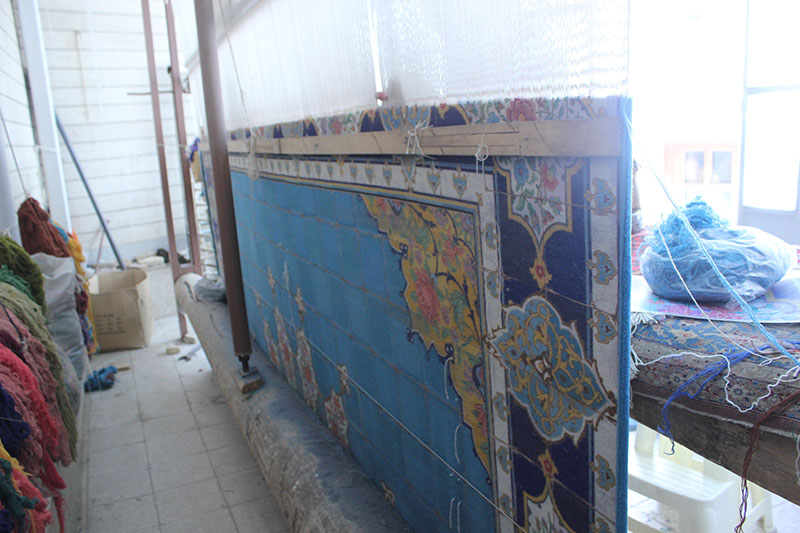 کارگاه بافندگی